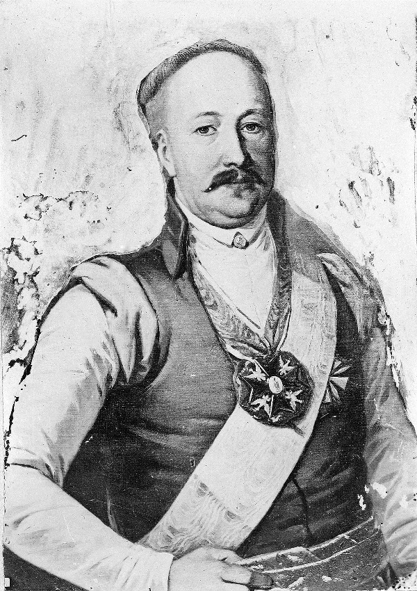 Беларуская (тарашкевіца): Партрэт Антонія Касакоўскага (Antoni Kasakoŭski)